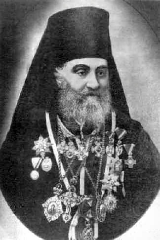 Епископ Никанор (в миру Никола Ружичич, серб. Никола Ружичић; 15 (27) апреля 1843, Свилеува — 16 (29) октября 1916, Белград) — епископ Белградской митрополии, епископ Нишский.